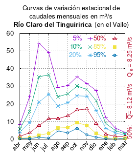 Curvas de variación estacional del río Claro (Tinguiririca) en el valle. # Dirección General de Aguas # Diagnóstico y clasificación de los cursos y cuerpos de agua según objetivos de calidad. Cuenca del río Rapel. # Santiago de Chile # Ministerio de Obras Públicas (Chile) # 2004 # url: # urlarchivo: # Tabla 4.8: Claro en el Valle pág. 63 mes 5% 10% 20% 50% 85% 95% abr 8.223 5.830 3.817 1.636 0.480 0.168 may 24.060 15.850 9.531 3.537 0.947 0.372 jun 54.369 35.283 20.899 7.681 2.239 1.085 jul 49.084 36.583 25.309 11.721 3.278 0.617 ago 29.373 23.939 18.686 11.637 6.495 4.611 sep 30.468 25.754 20.801 13.236 6.543 3.616 oct 35.289 30.109 24.708 16.552 9.306 6.019 nov 31.518 28.312 24.429 17.006 7.864 2.494 dic 27.606 21.894 16.339 8.817 3.251 1.186 ene 12.219 8.945 6.063 2.715 0.748 0.159 feb 6.426 4.960 3.490 1.534 0.377 0.124 mar 3.802 3.012 2.271 1.324 0.681 0.461 This plot was created with Gnuplot.